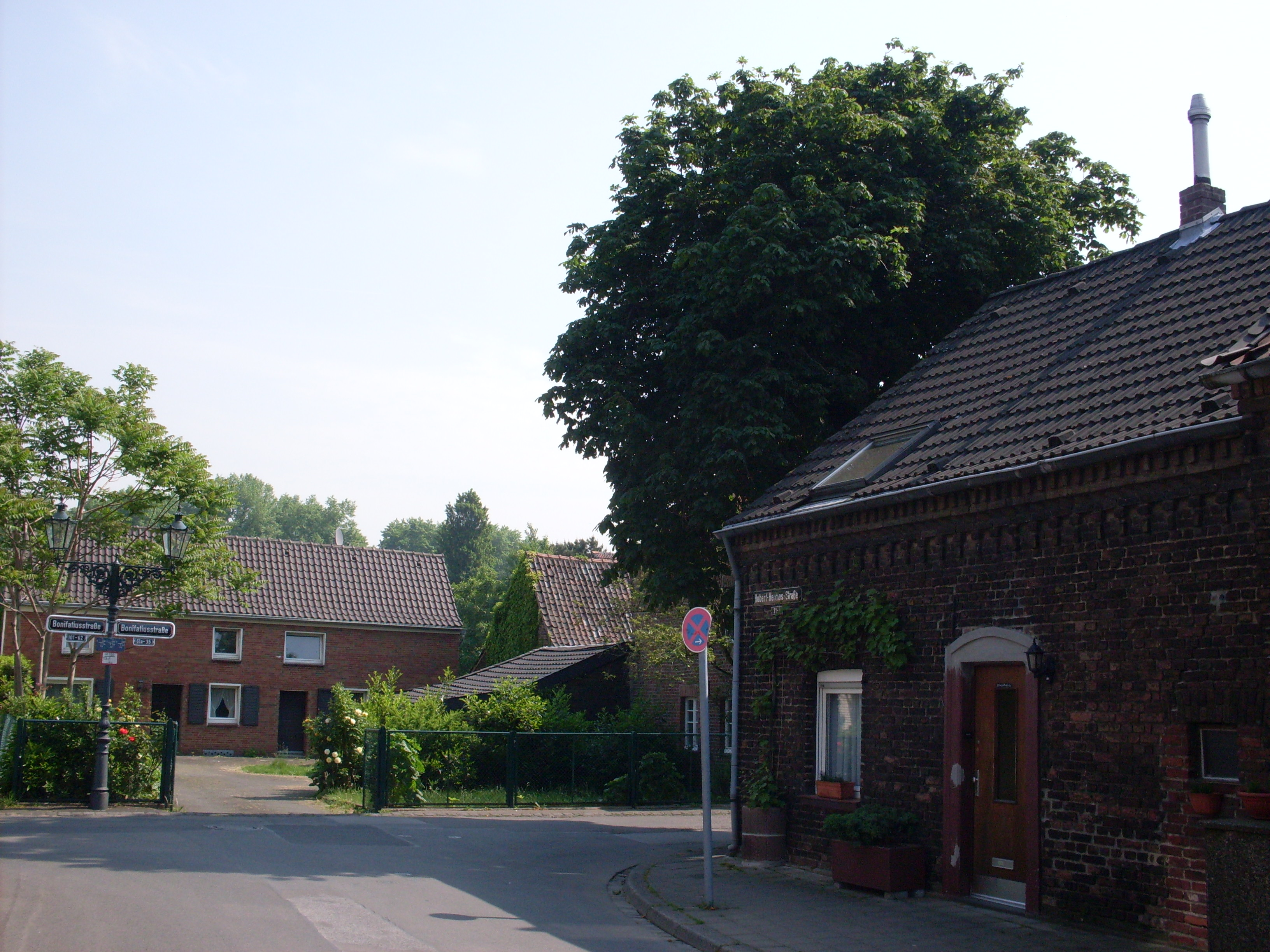 Düsseldorf Alt-Lörick, Teil des Stadtteils Lörick